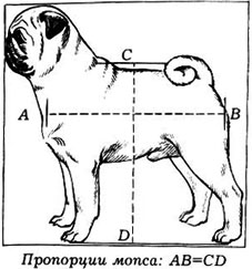 пропорции мопса